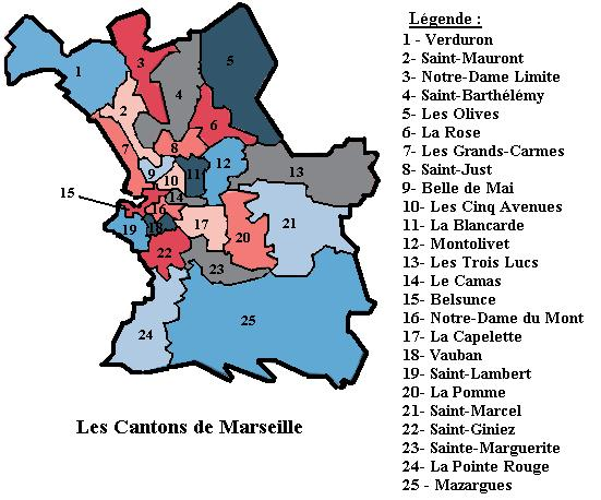 Le découpage des Cantons de Marseille. Illustration personnelle.